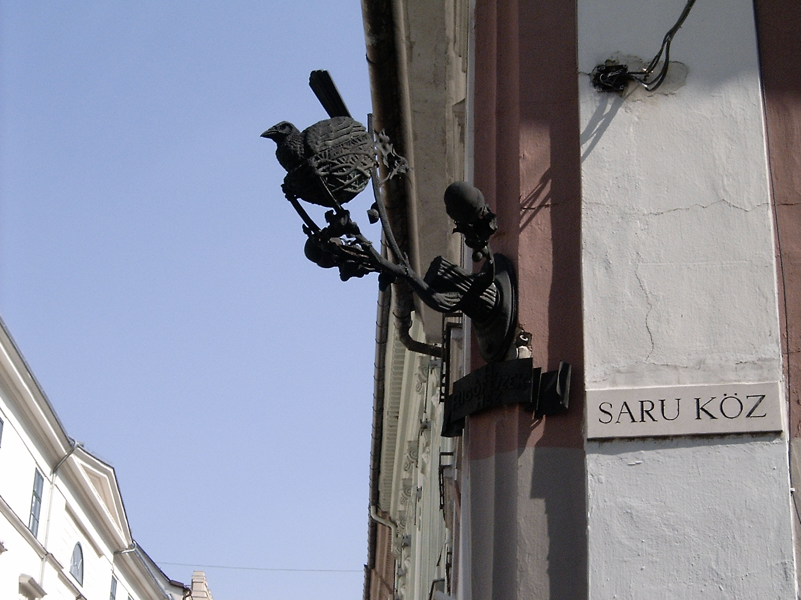 Rigófészek-cégér (Alternatív, helyi cím: A Rigófészekhez) két nagyobb makkal. Schima Bandi avagy Schima B. András (ötvösművész), 1938. Egykor a helyi vendéglő hírverését nem szolgálta. - Magyarország, Győr-Moson-Sopron megye, Győr, Liszt Ferenc utca 14., Saru köz sarkán